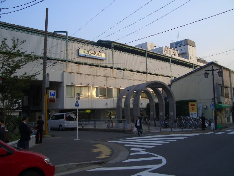 京急久里浜駅裏口。2004年11月10日、本人撮影。